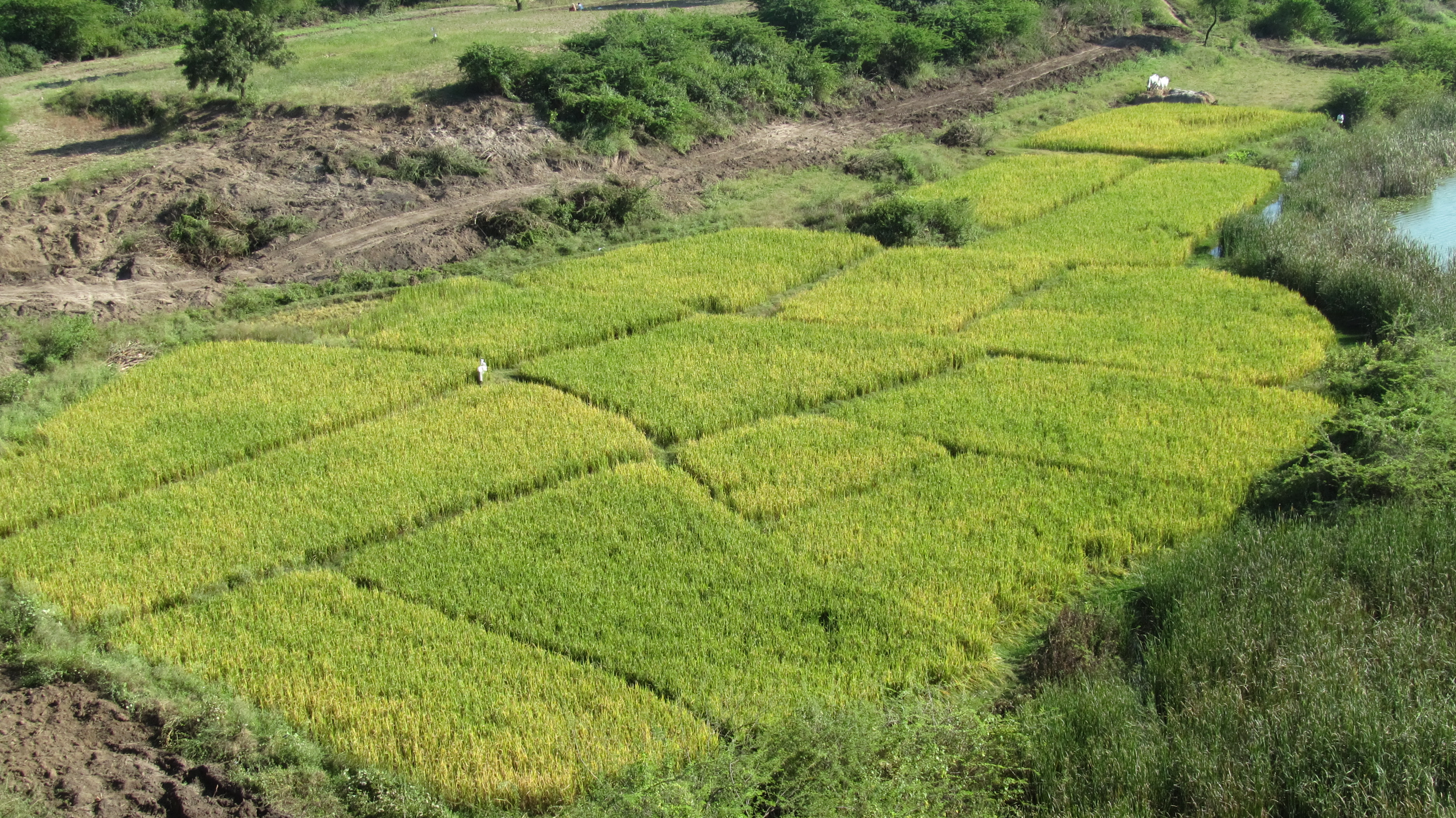 വാറങ്കല്‍